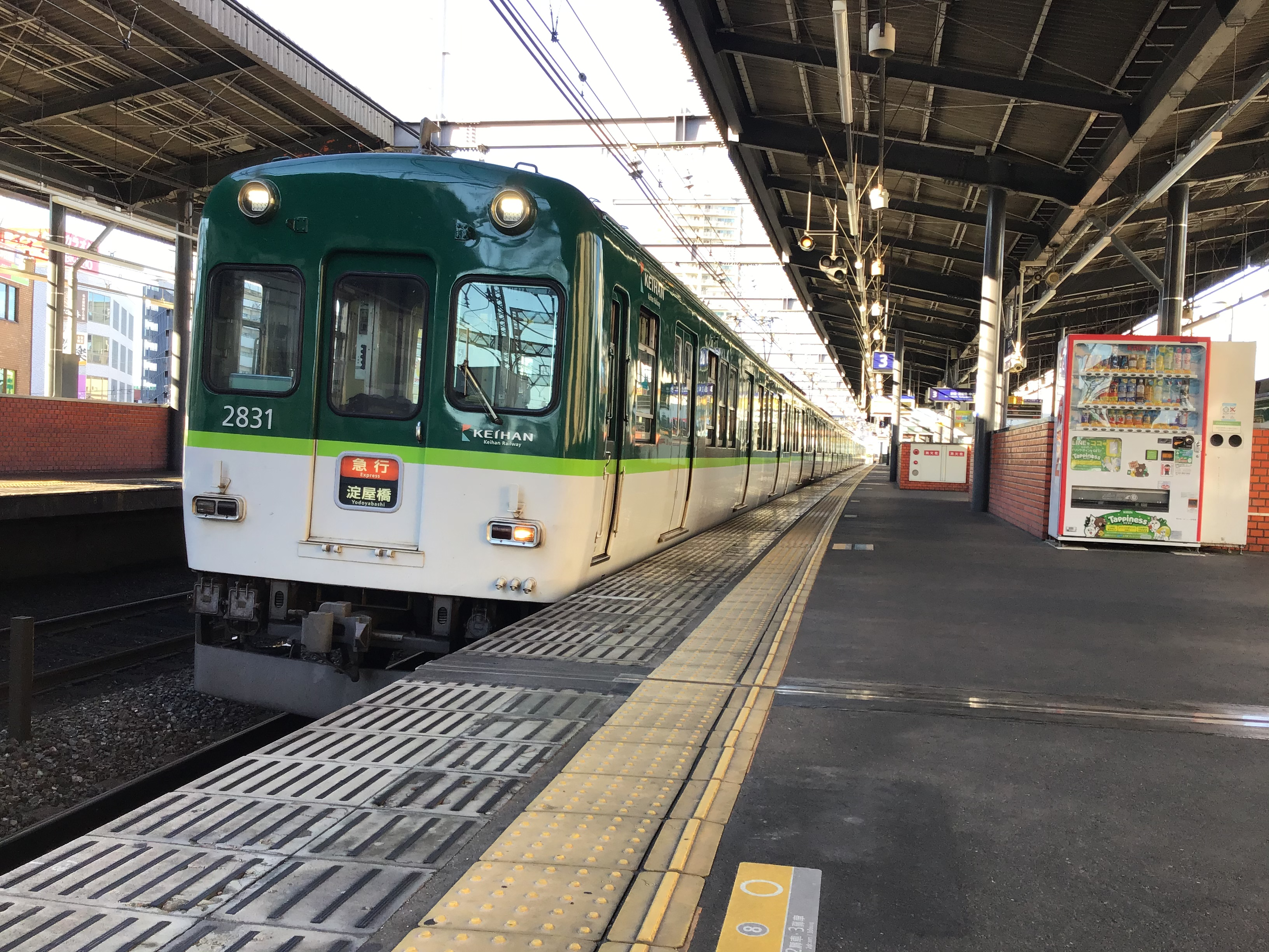 京阪本線で運用中の2631F